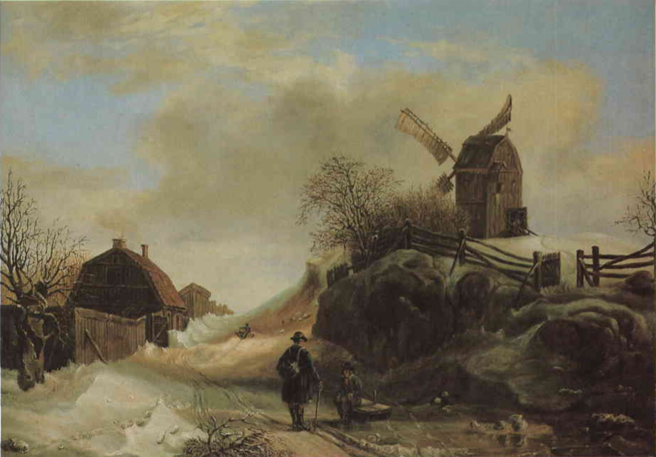 Kvarnen Spelbomskan på Observatoriekullen. Kopia efter oljemålning av J C Berger 1846. I Stockholms stadsmuseums samlingar